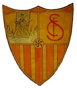 Escudo del Sevilla FC, diseñado en 1921 por Pablo Domínguez.